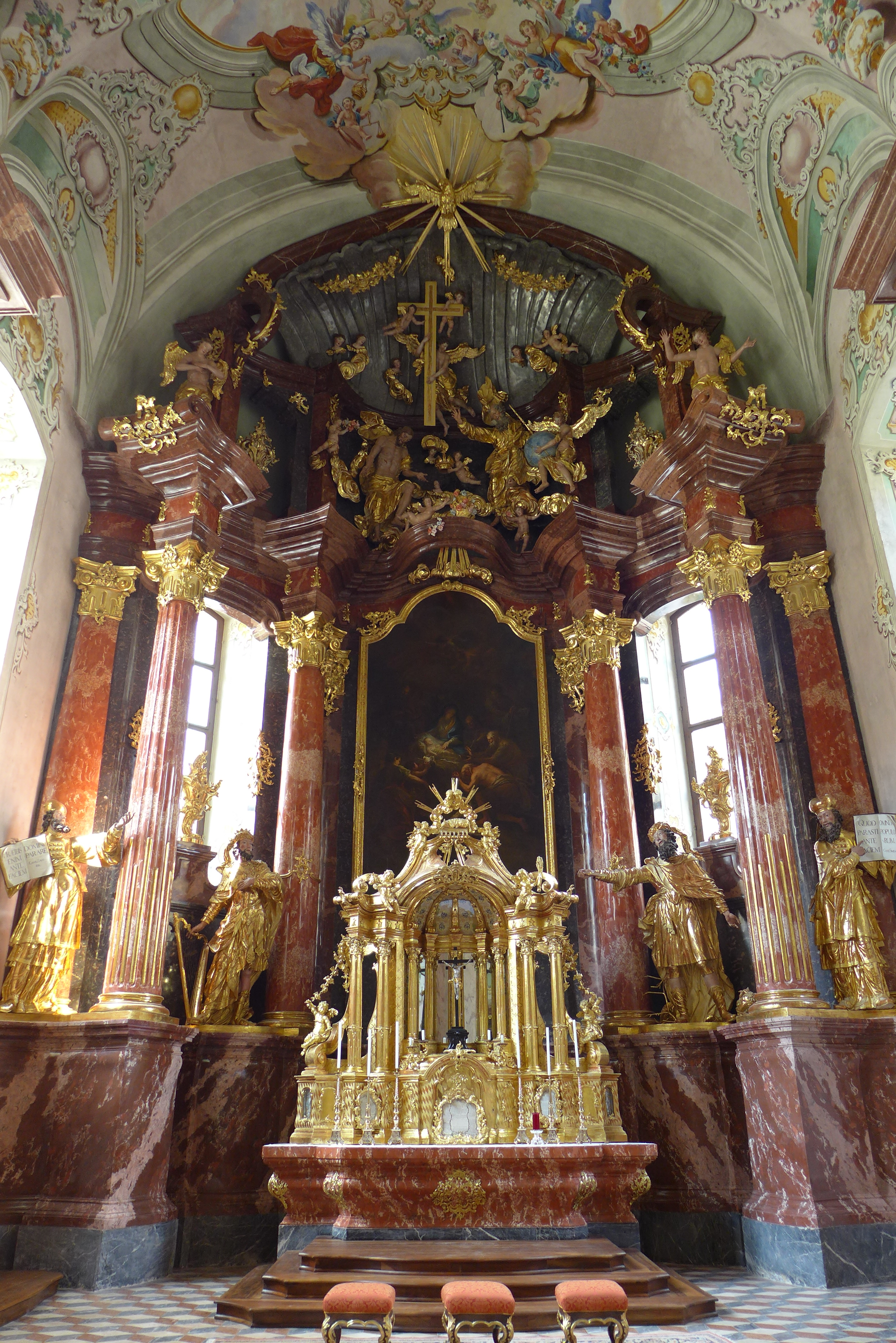 Stiftskirche Rein - Hochaltar 2